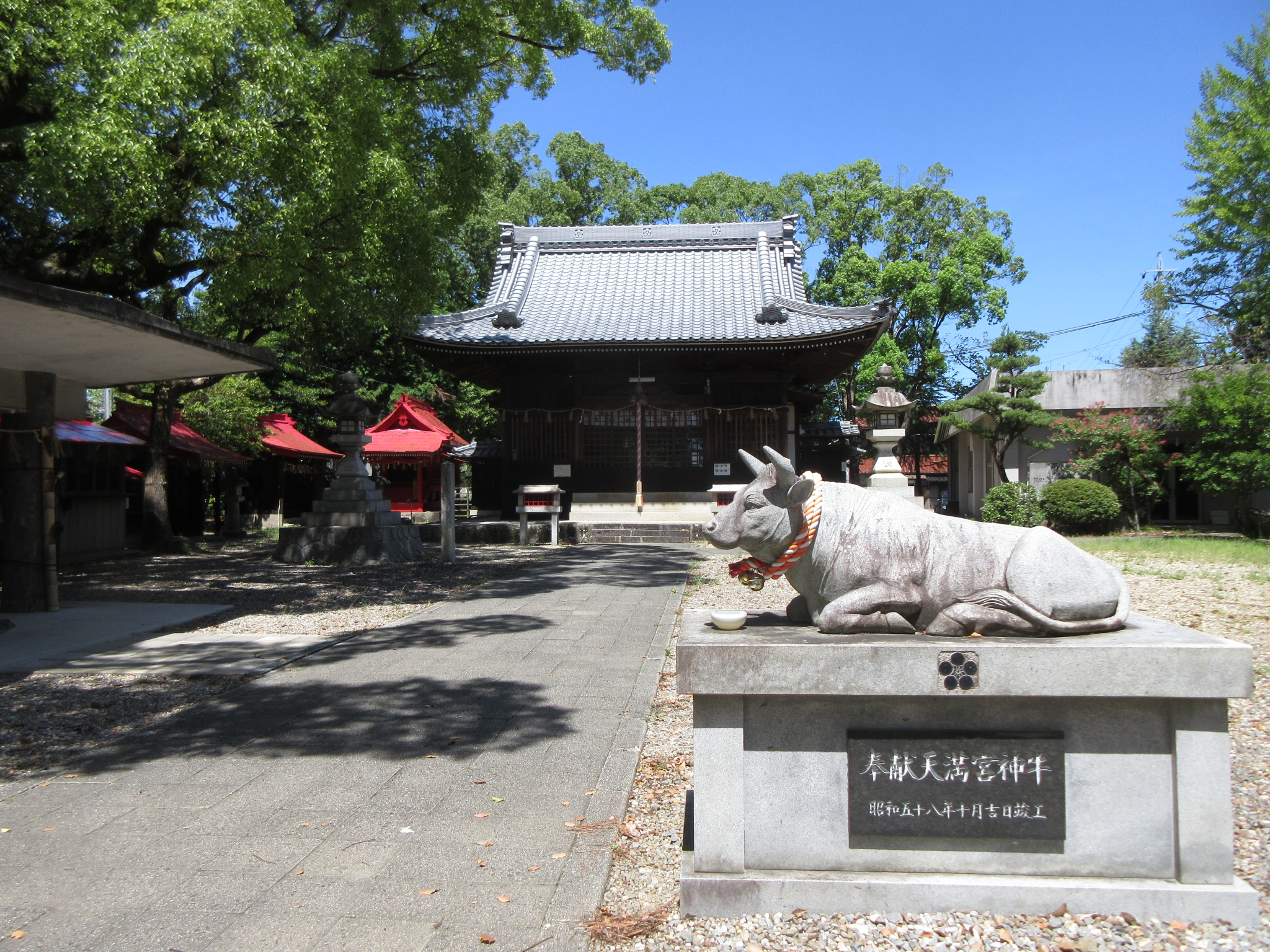 鴨田八幡宮（岡崎市鴨田町）